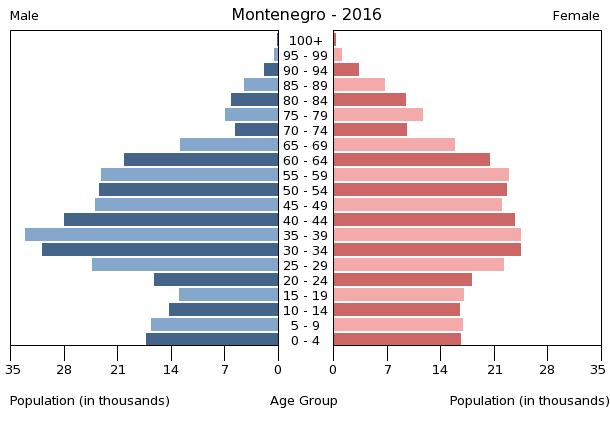 A